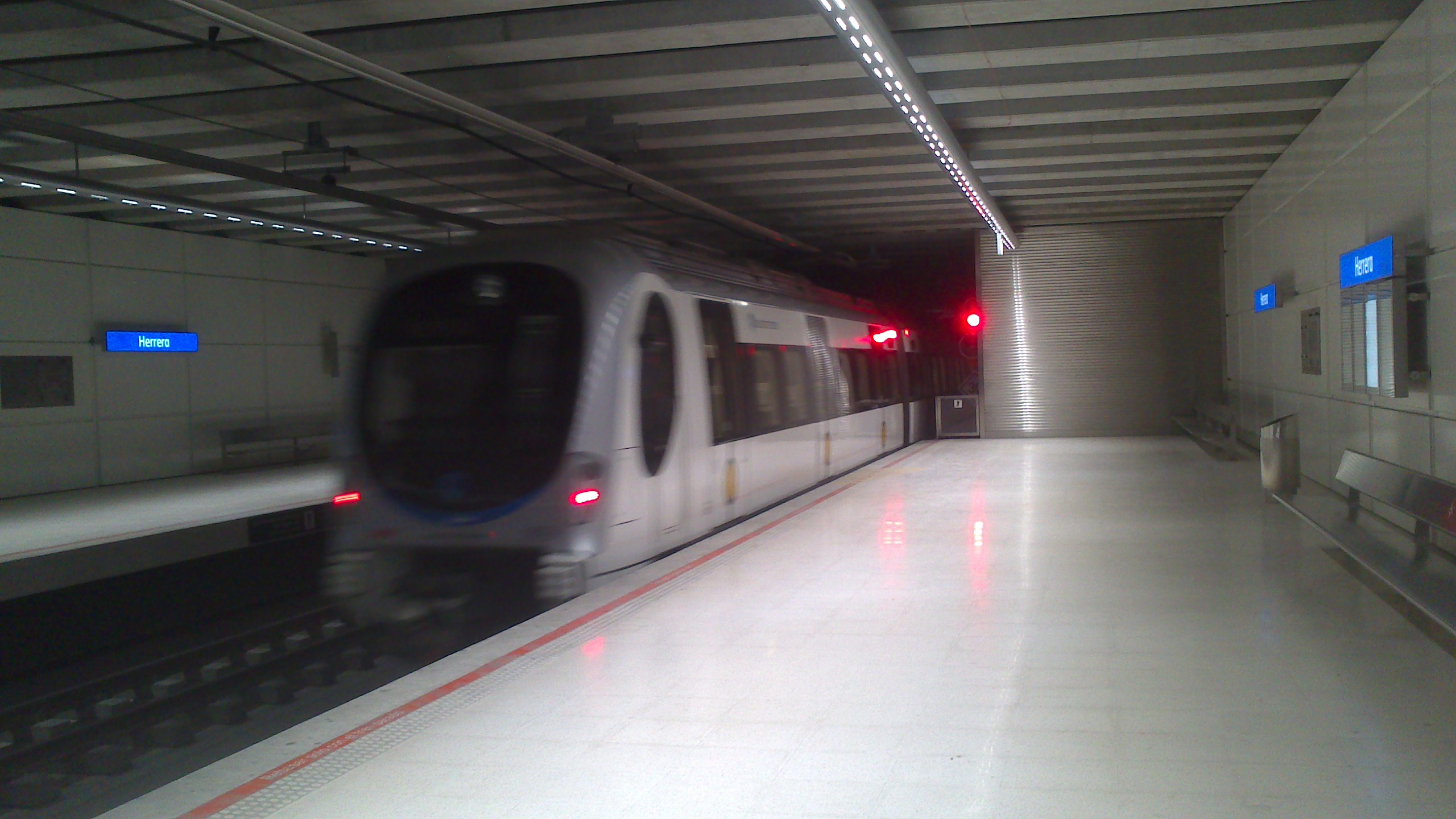 Sale de Herrera para cambiar de sentido e ir hacia Lugaritz